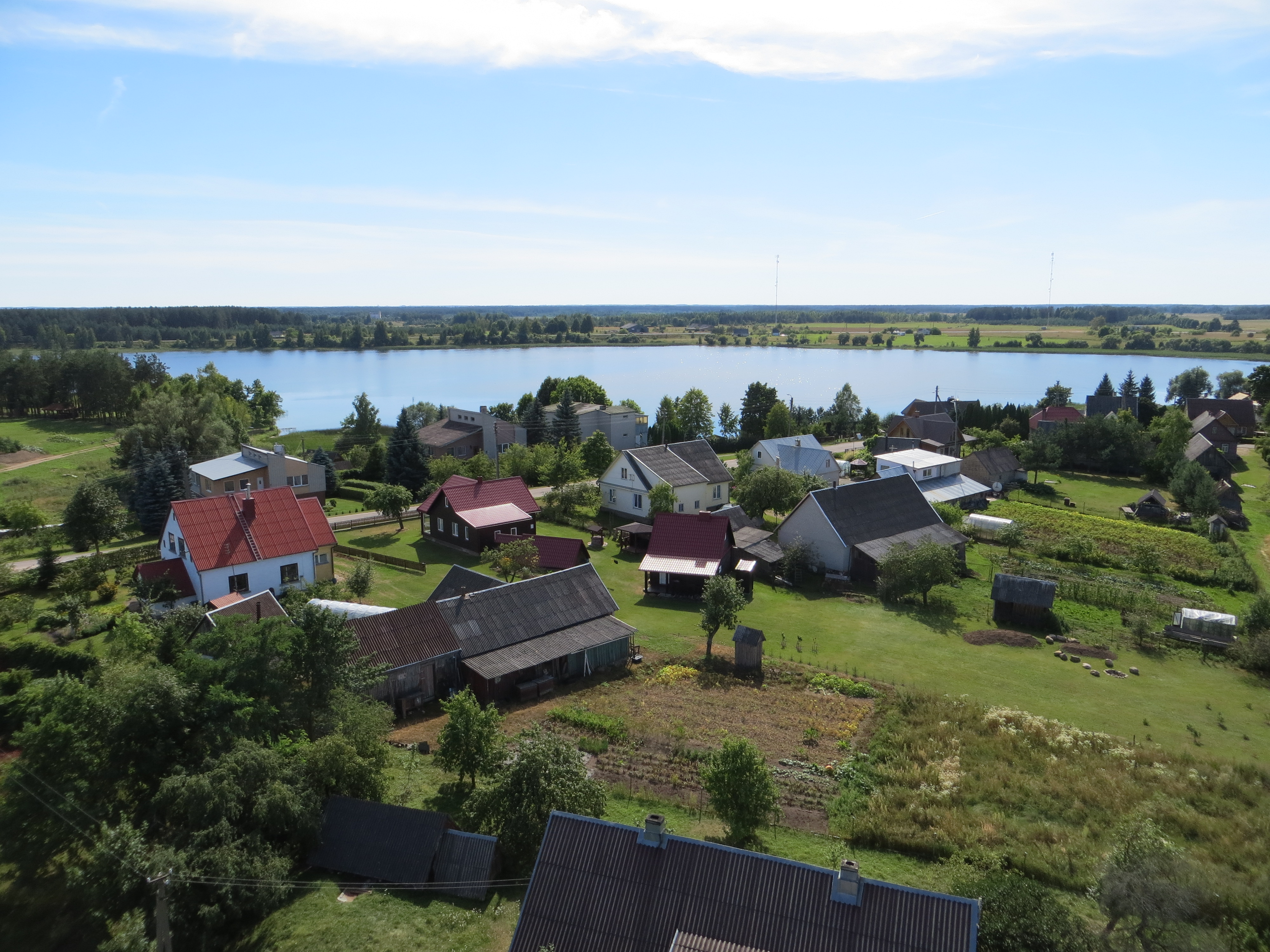 Svėdasai, Lithuania